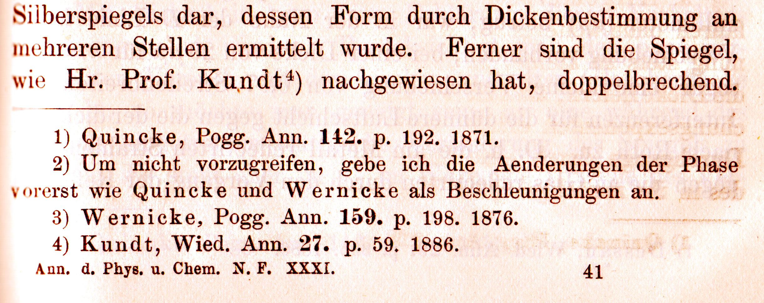 Fußzeilen aus den Annalen der Physik, Band 267